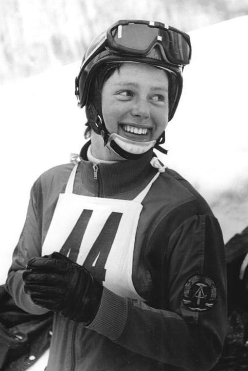 Anna-Maria Müller Zentralbild Thieme 28.2.1971-Oberwiesenthal: II. Internationaler Mitropa-Pokal im Rennschlittensport (2. Tag)-Im Einsitzerwettbewerb der Damen siegte Anna-Maria Müller (DDR) bereits beim Nachtlauf am 27.2.1971, da der vierte Lauf am 28.2. wegen Schneesturms abgesetzt werden musste.